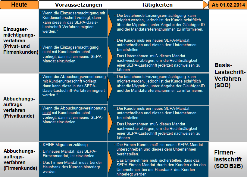 Darstellung der Umwandlungsmöglichkeiten für bestehende Einzugs- und Abbuchungsvereinbarungen im Rahmen der SEPA-Umstellung.